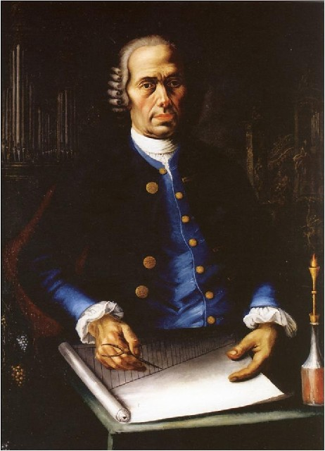 Porträt von Karl Joseph Riepp, Orgelbaumeister; entstanden in Salem 1774 (heute Cathédrale de Dijon)